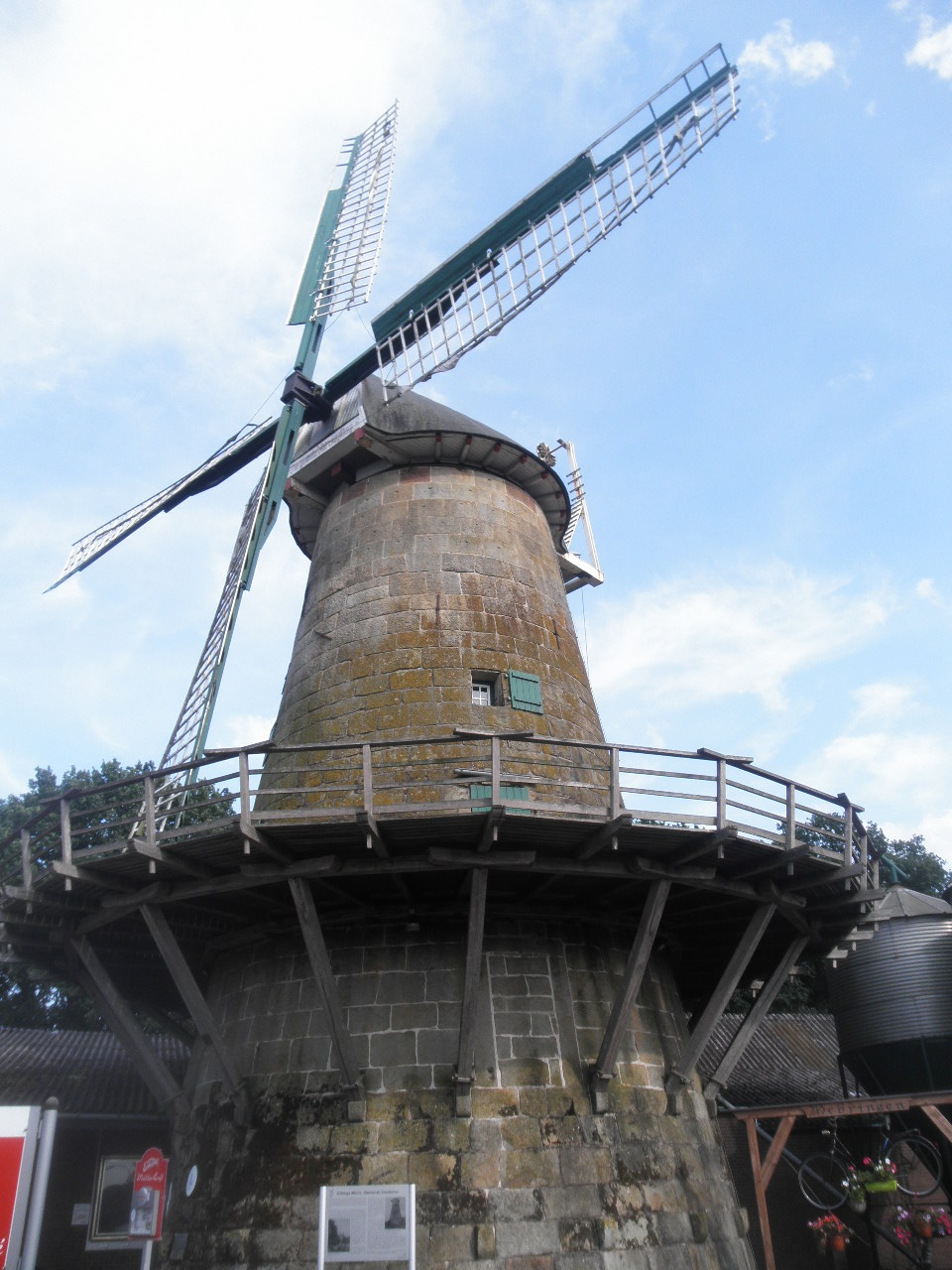 muelejo Enkings Mühle en Emsbüren